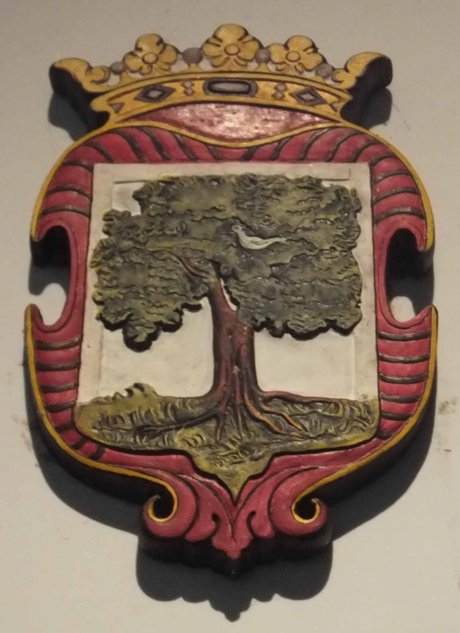 සිංහල: ලන්දේසි යුගයේ කොළඹ ලාංඡනය